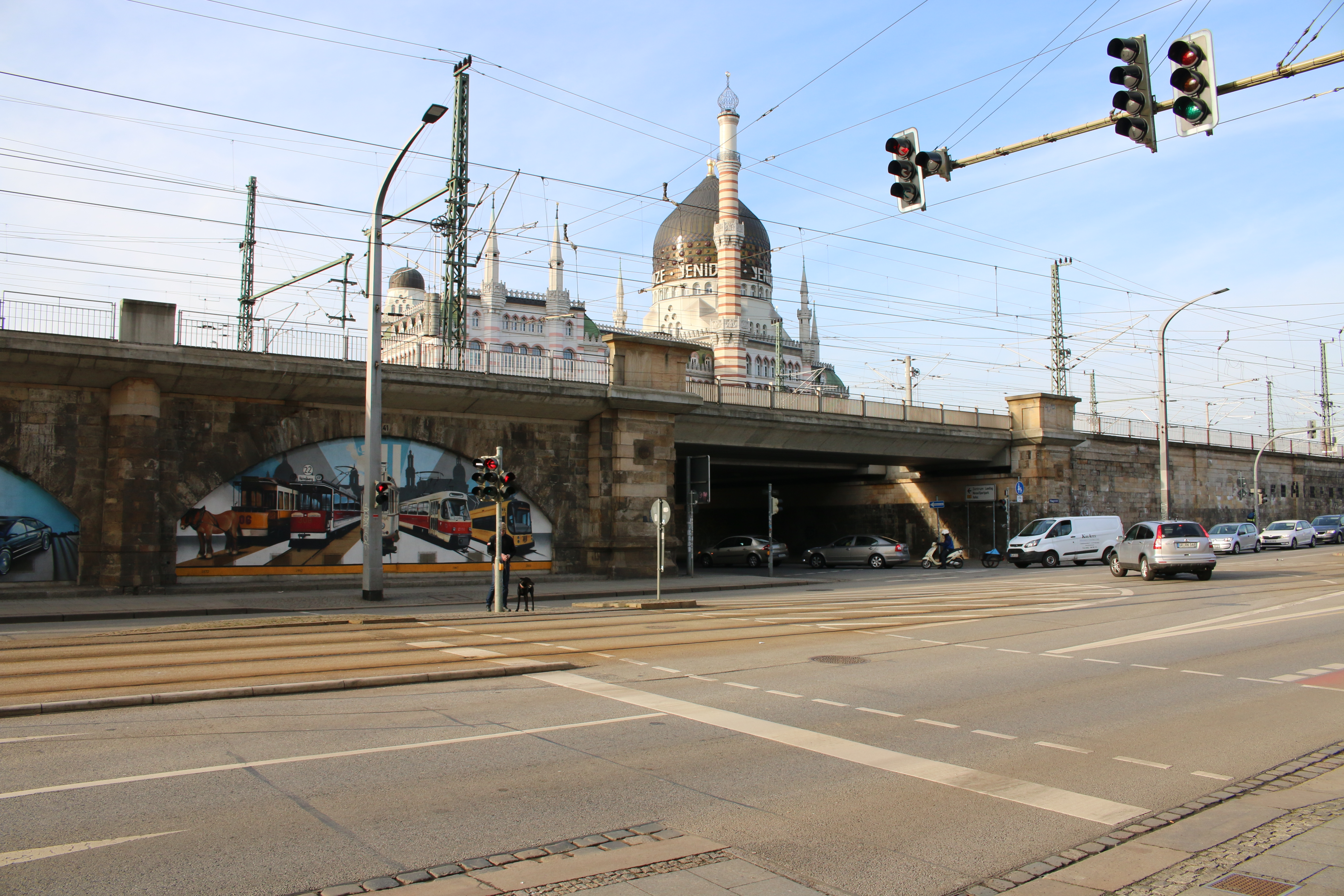 Blick von der Kreuzung Ostra-Allee/Könneritzstraße auf die Yenidze; im Vordergrund der Bahndamm der Bahnstrecke Děčín–Dresden-Neustadt